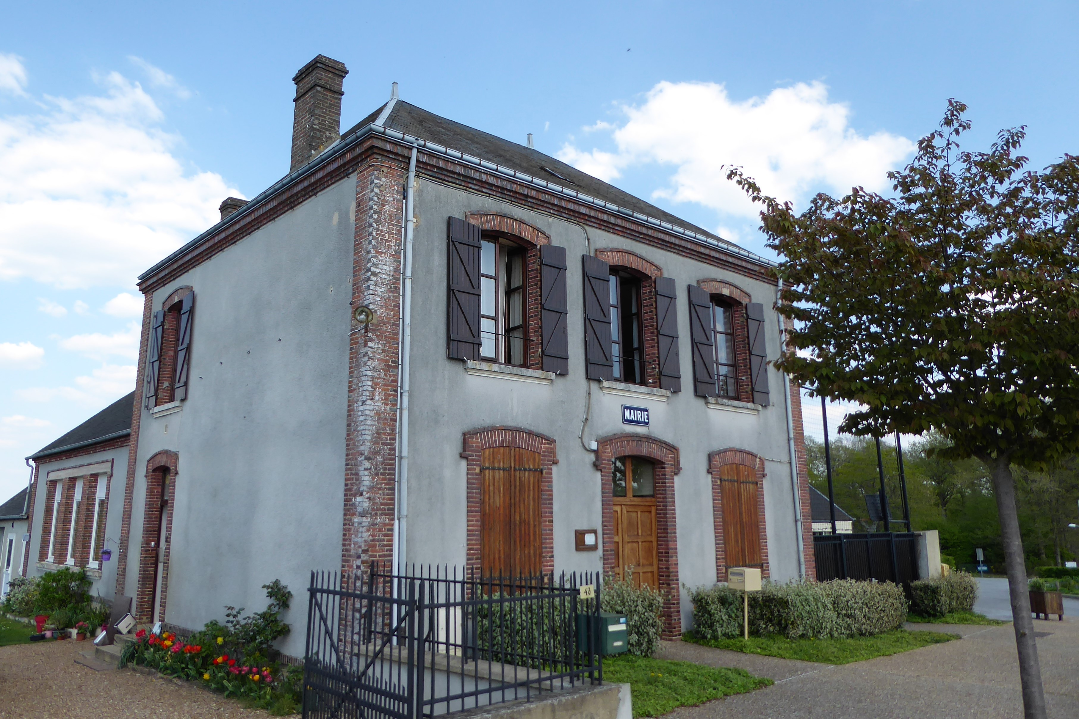 mairie de Champrond-en-Perchet, Eure-et-Loir, France.